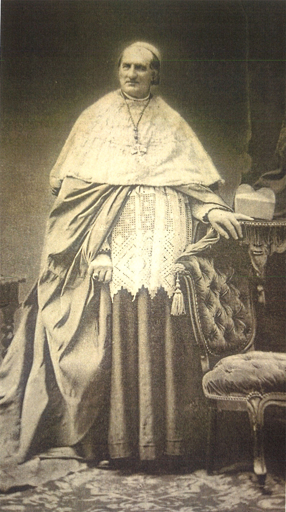 Der Lyonnaiser Erzbischof und Kardinal Louis-Marie-Joseph-Eusèbe Caverot (* 26. Mai 1806 in Joinville; † 23. Januar 1887 in Lyon)